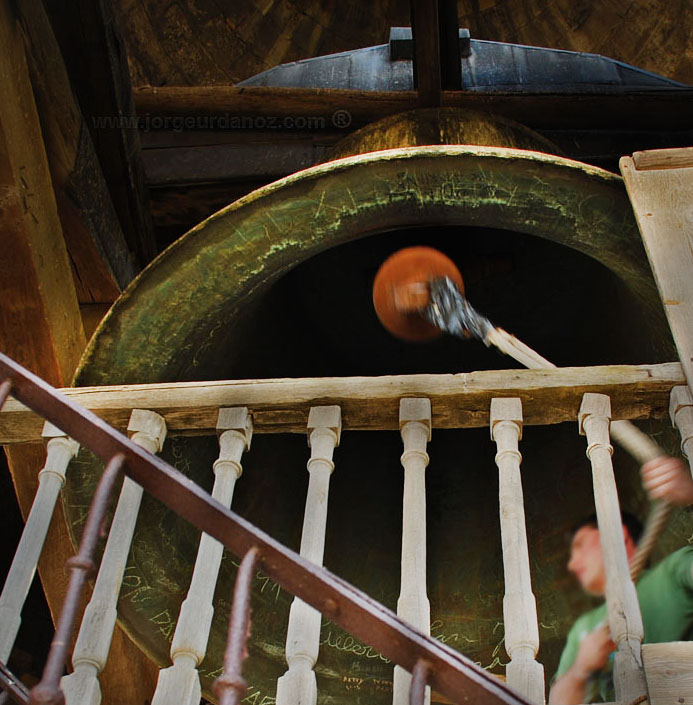 Tocando la campana María de la catedral de Pamplona.